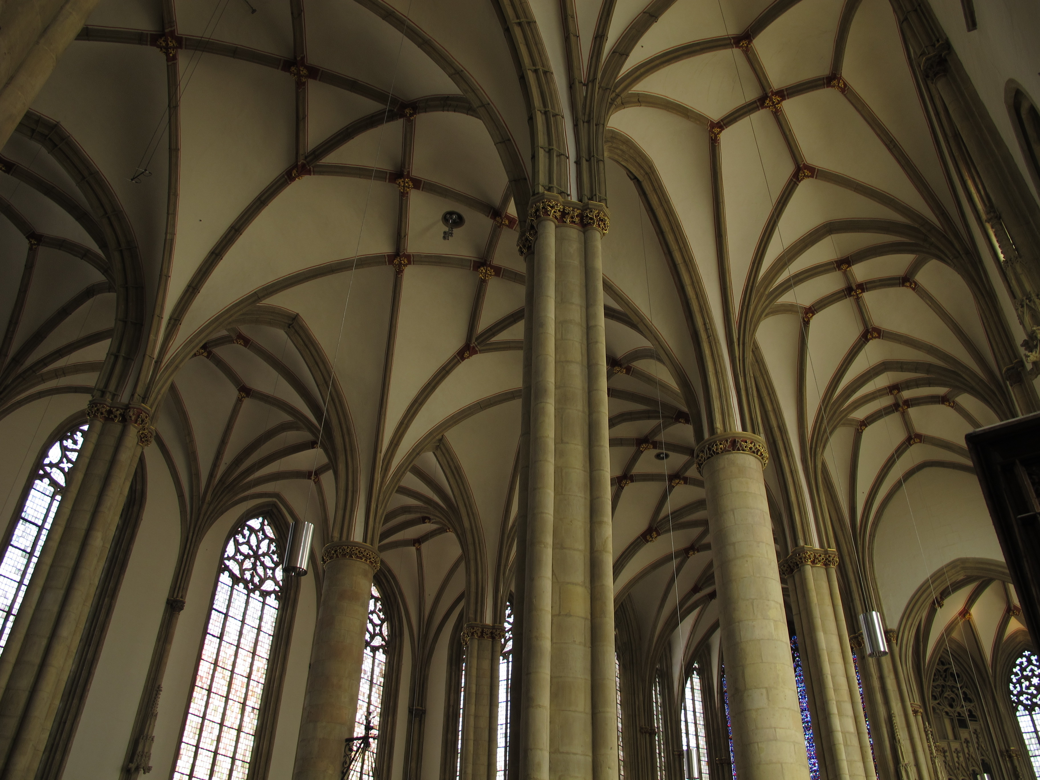 Lambertikirche in Münster: Decke